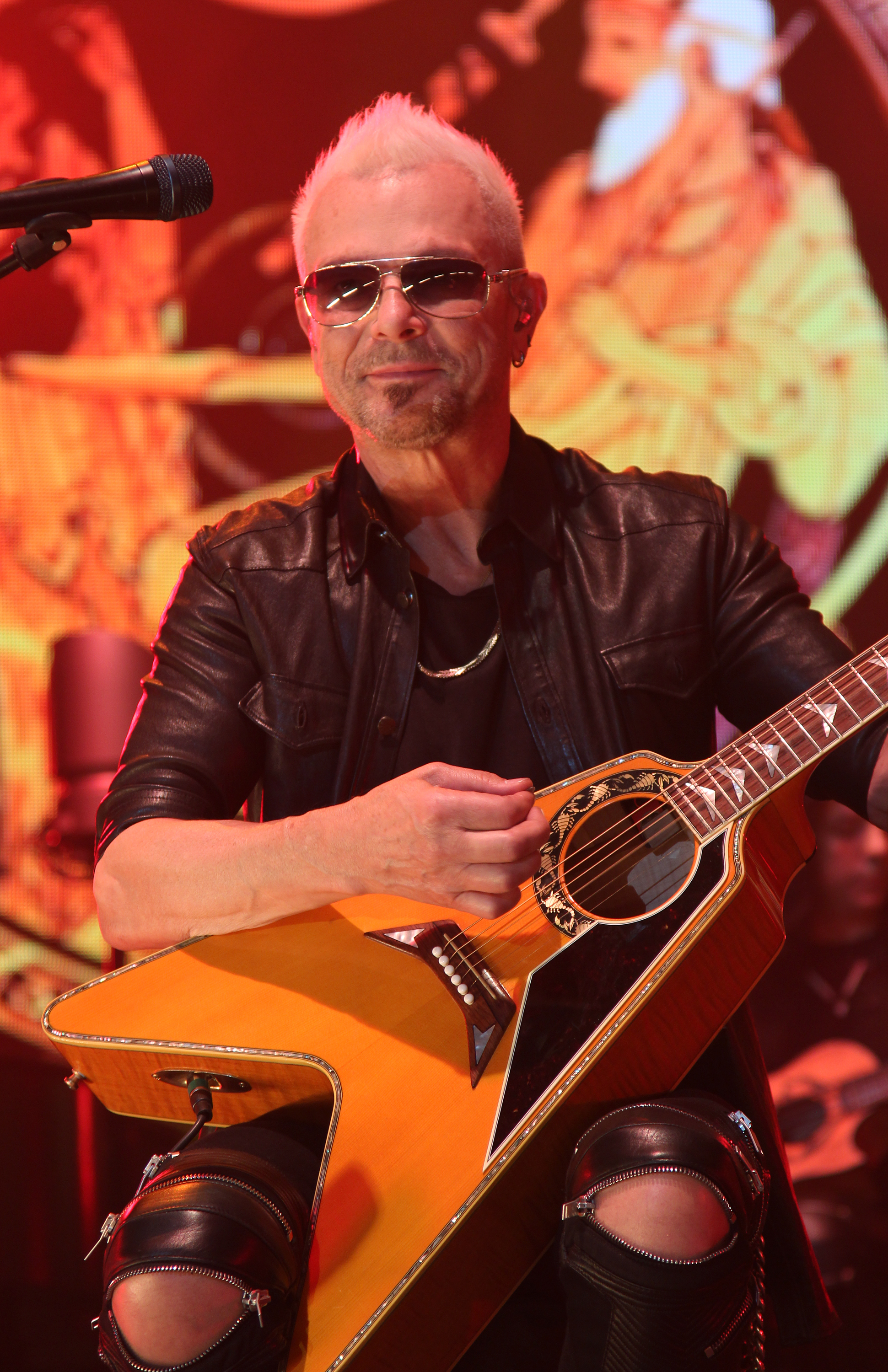 Rudolf Schenker - Scorpions MTV Unplugged April 2014